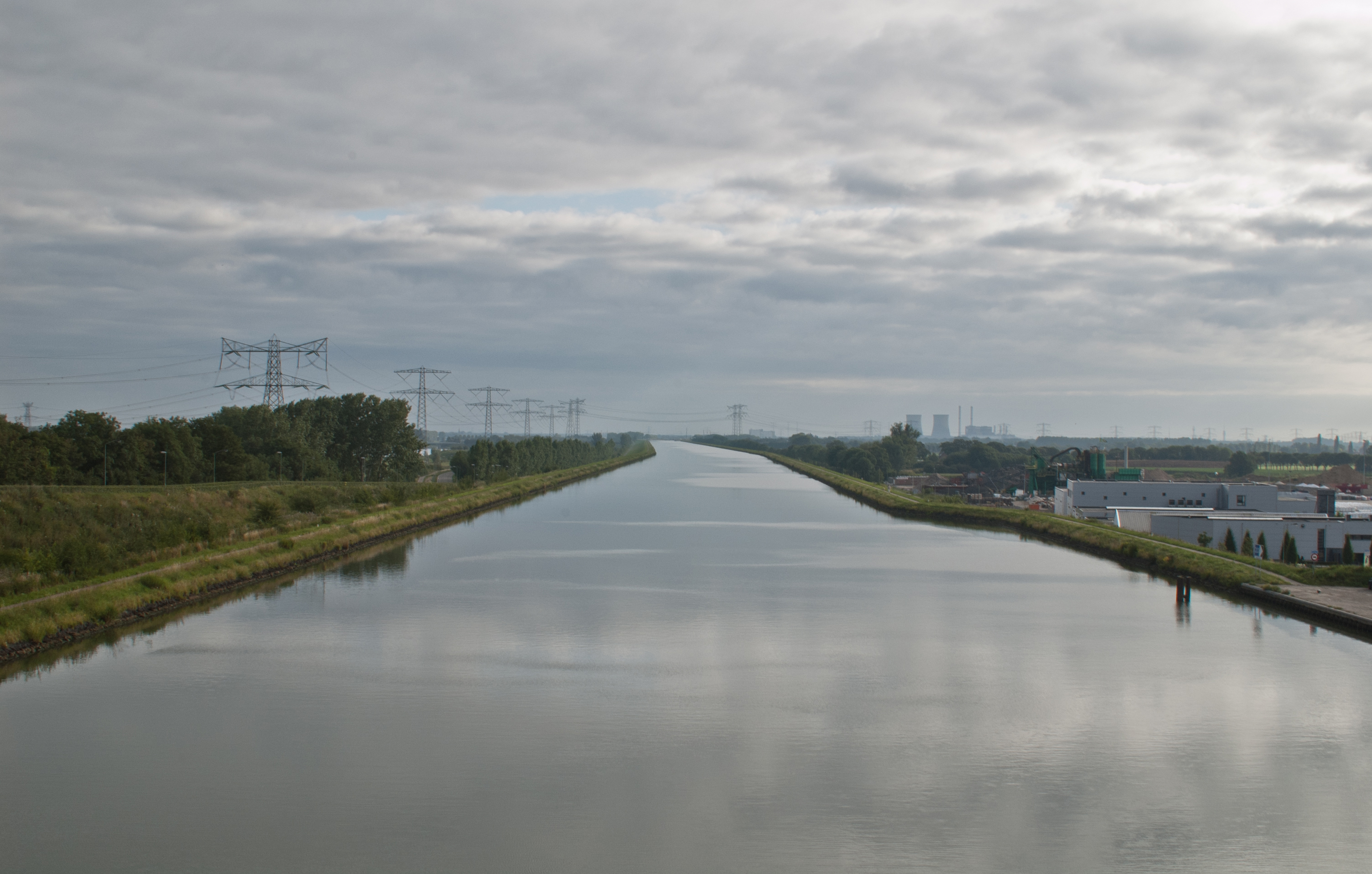 Der Julianakanal, aufgenommen von der Brücke zwischen Echt und Ohe en Laak, Blickrichtung Maasbracht. Im Hintergrund das Kraftwerk in Maasbracht, die Claus-Centrale.